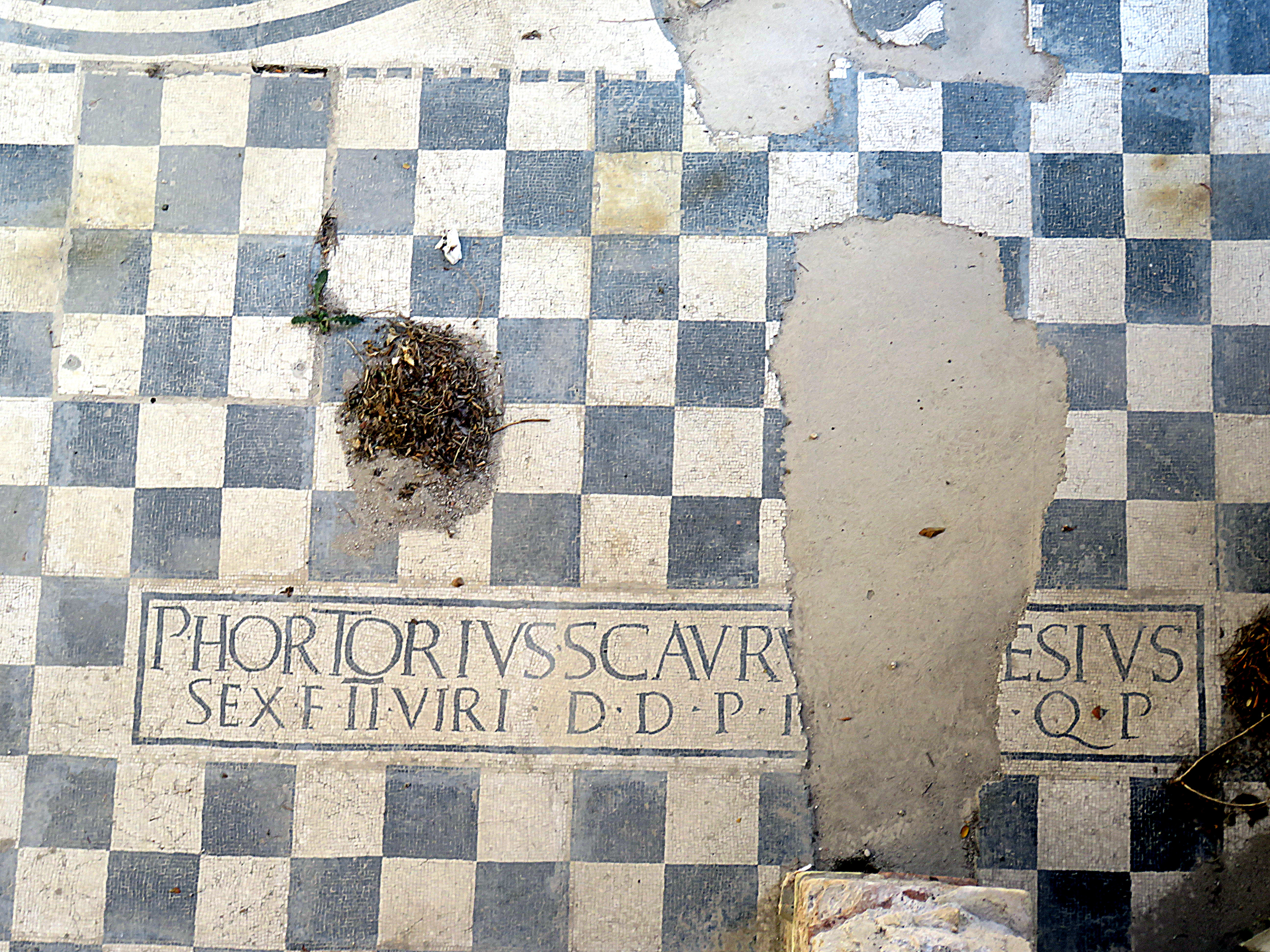 Anfiteatro romano di Ancona - iscrizione nel mosaico dell'area archeologica circostante